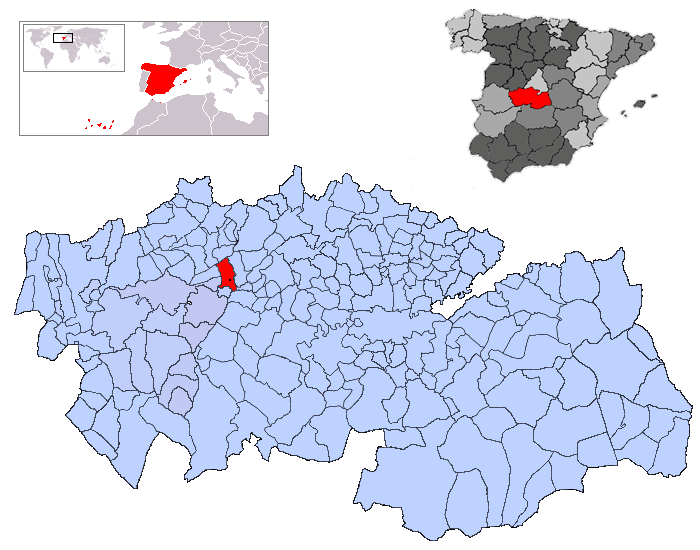 Lucillos en la provincia de Toledo